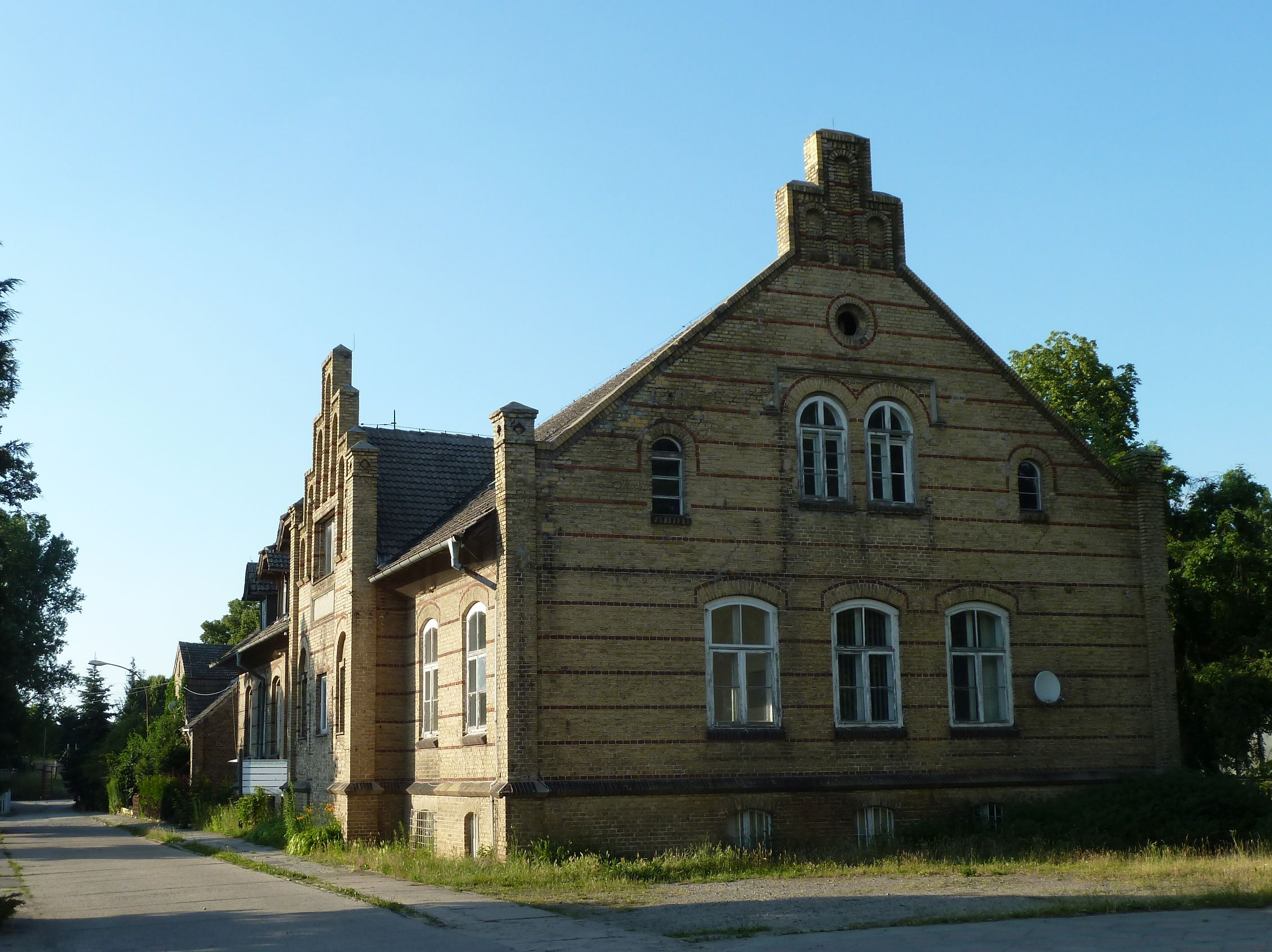 Denkmalgeschütztes GuthausFalkenrehde